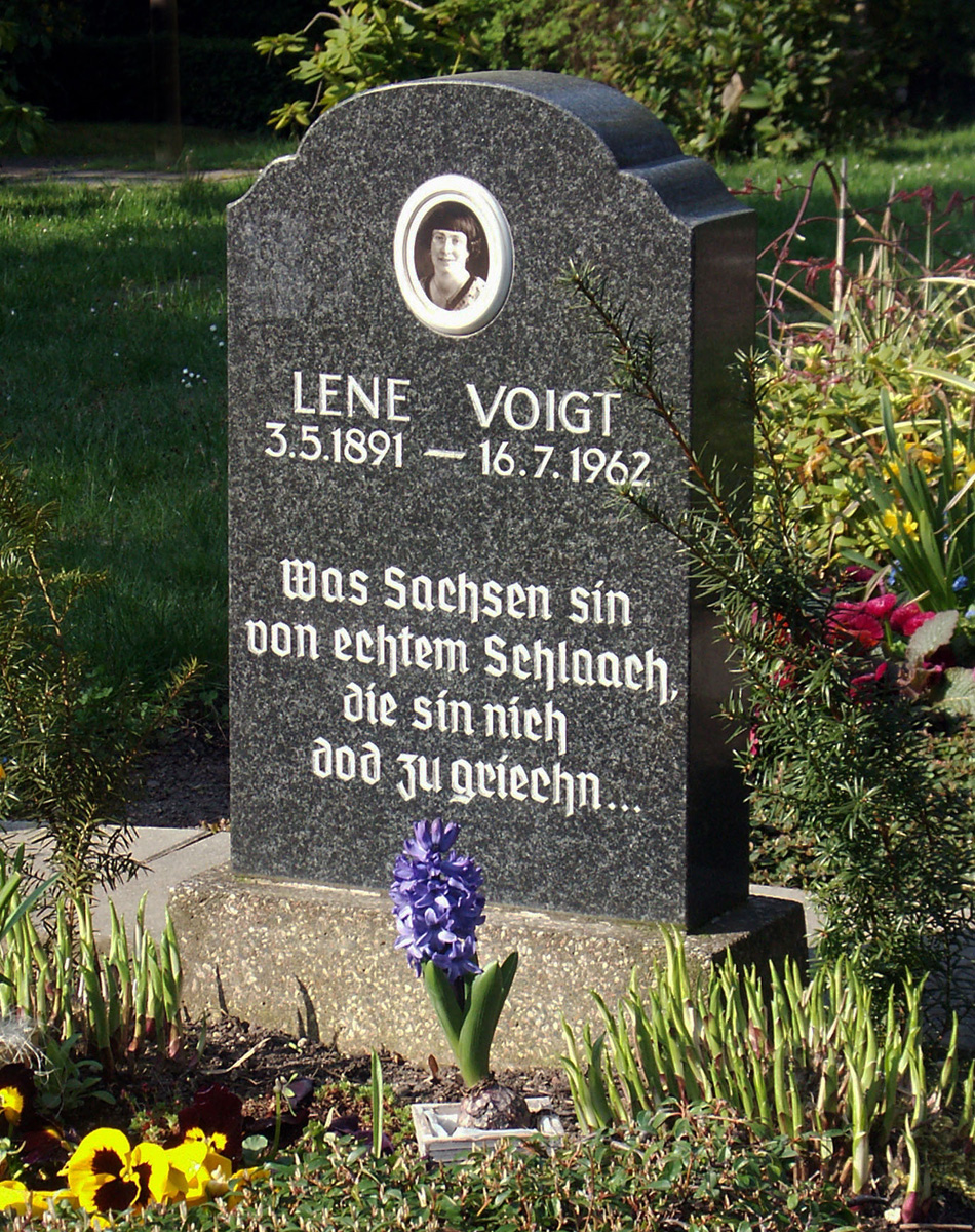 Der Grabstein der Schriftstellerin und Mundartdichterin Lene Voigt auf dem Leipziger Südfriedhof mit einem falschen Geburtsdatum. Inzwischen wurde die Inschrift des Grabsteins auf den 2.5. korrigiert.